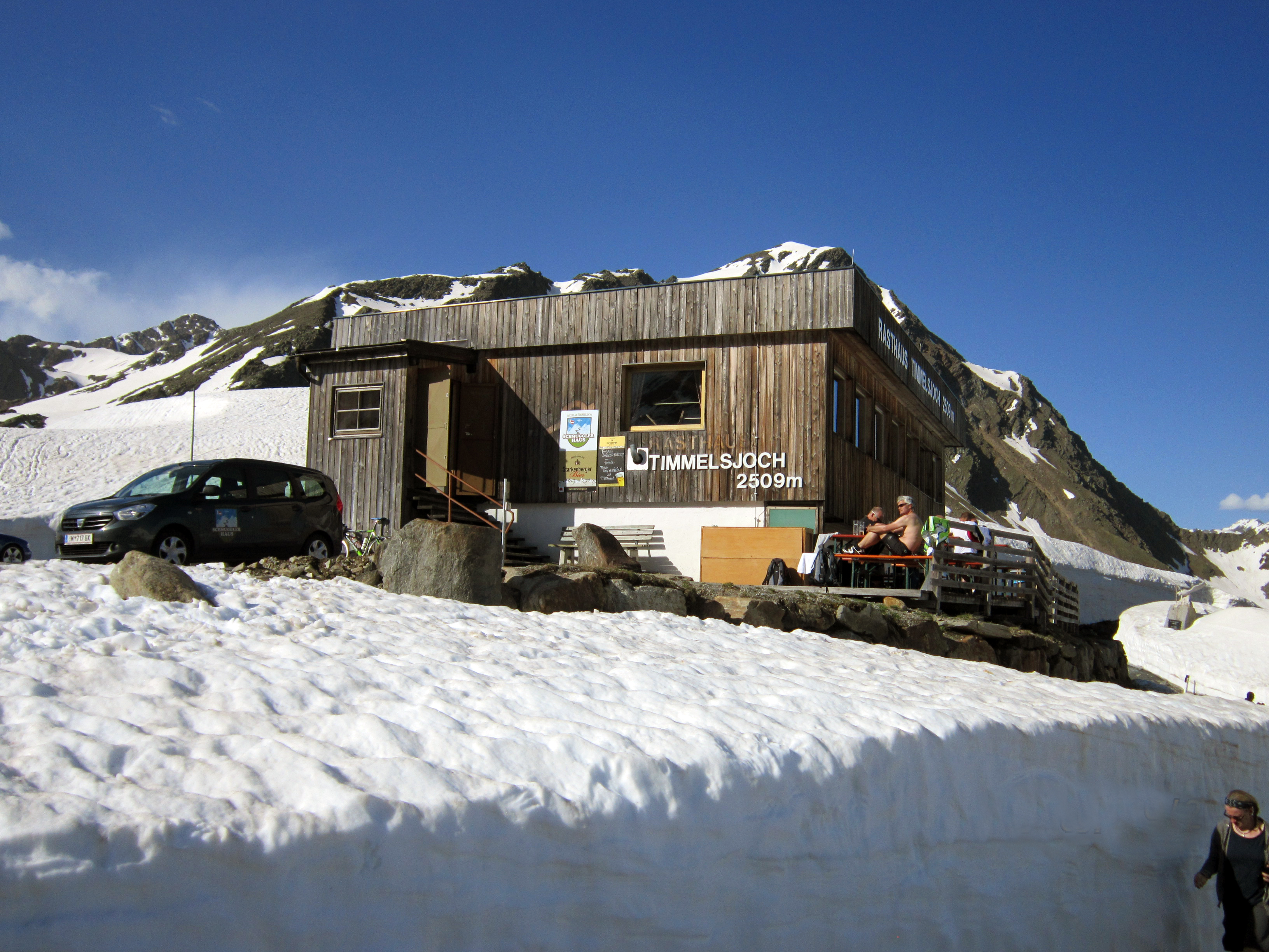 Cascate di Stieber